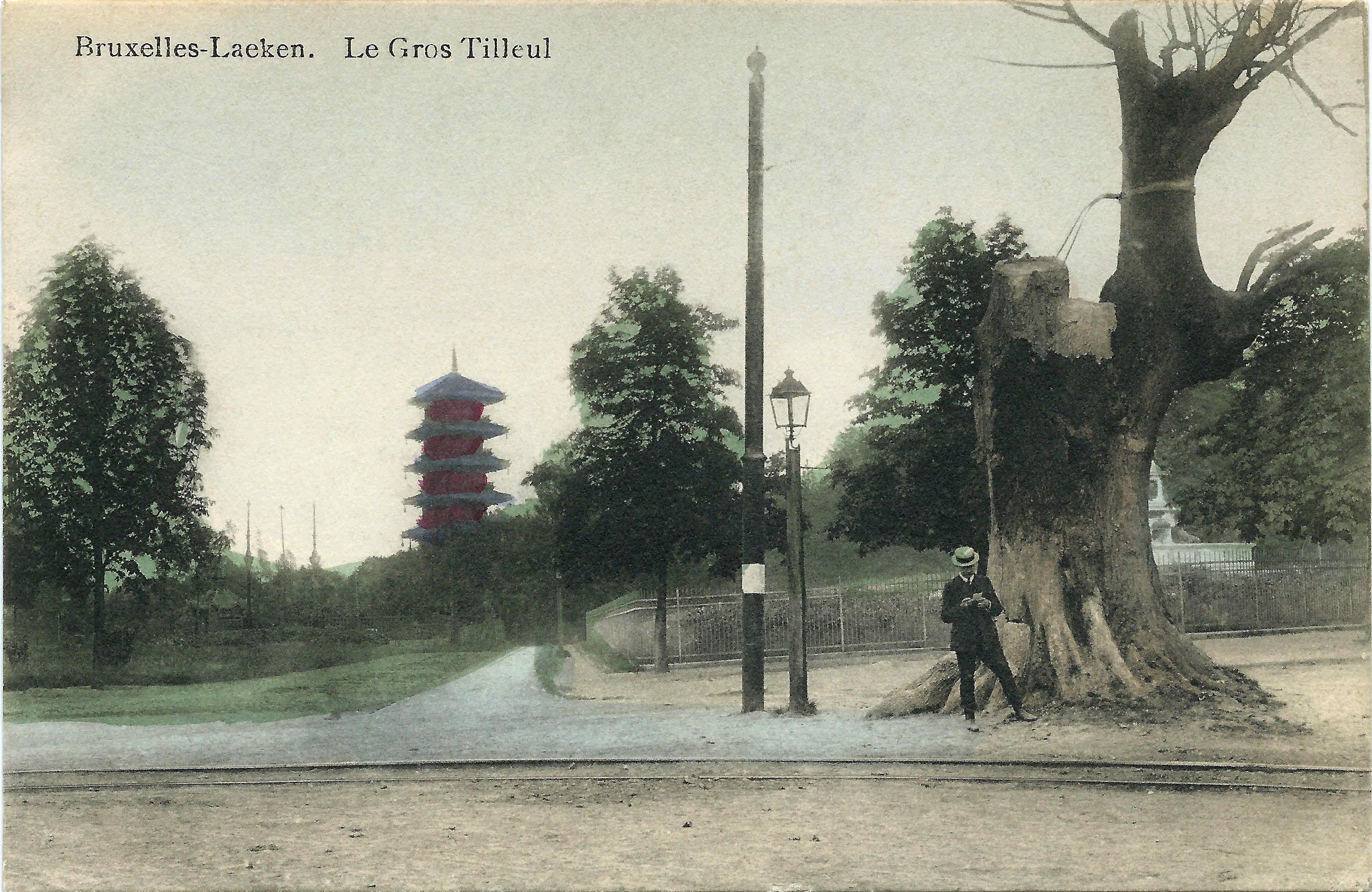 De vroegere buurtspoorweg tramhalte 'Dikke Linde' met de oorspronkelijke boom en de Japanse toren op de achtergrond.